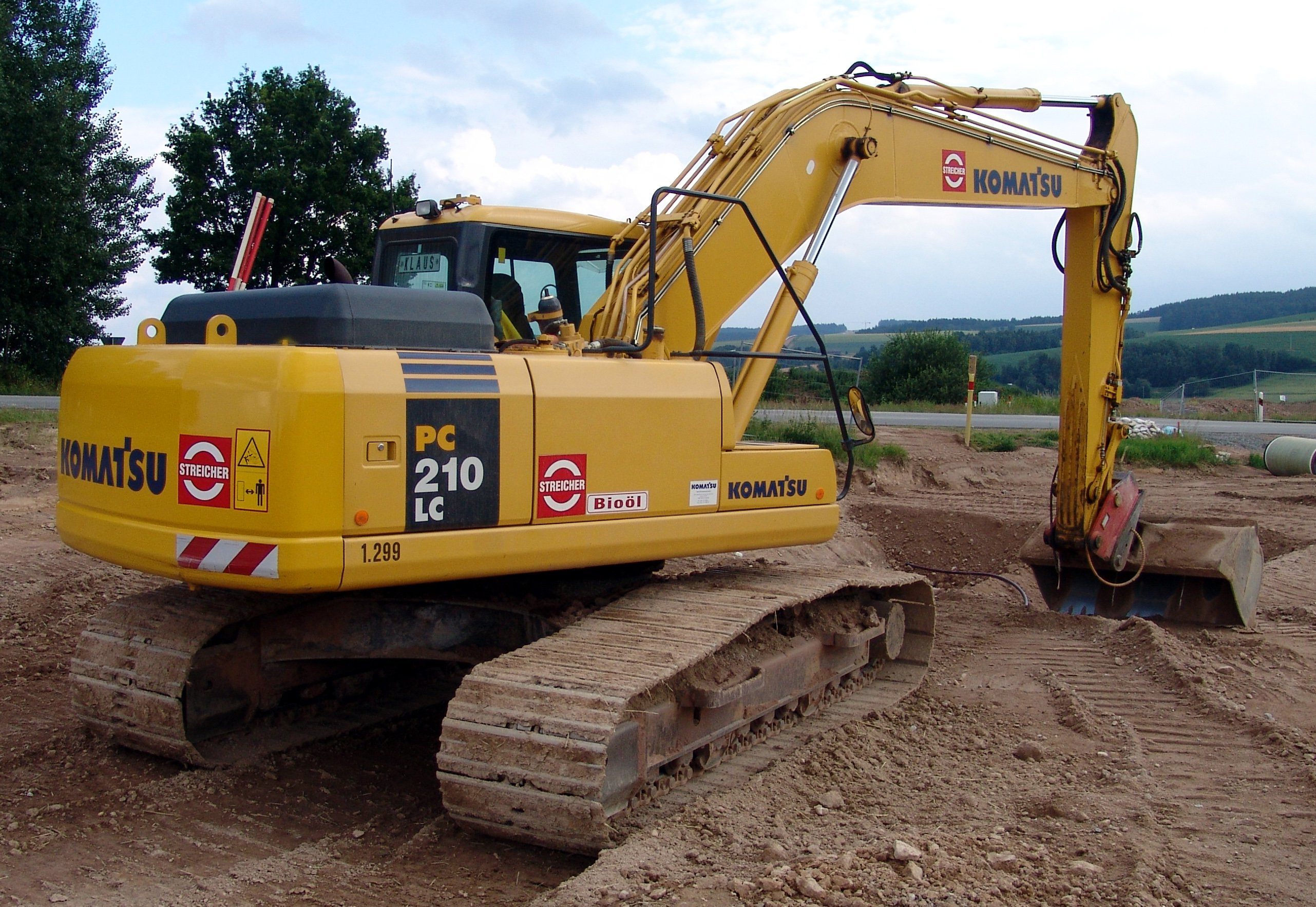 Komatsu 210 Raupenbagger